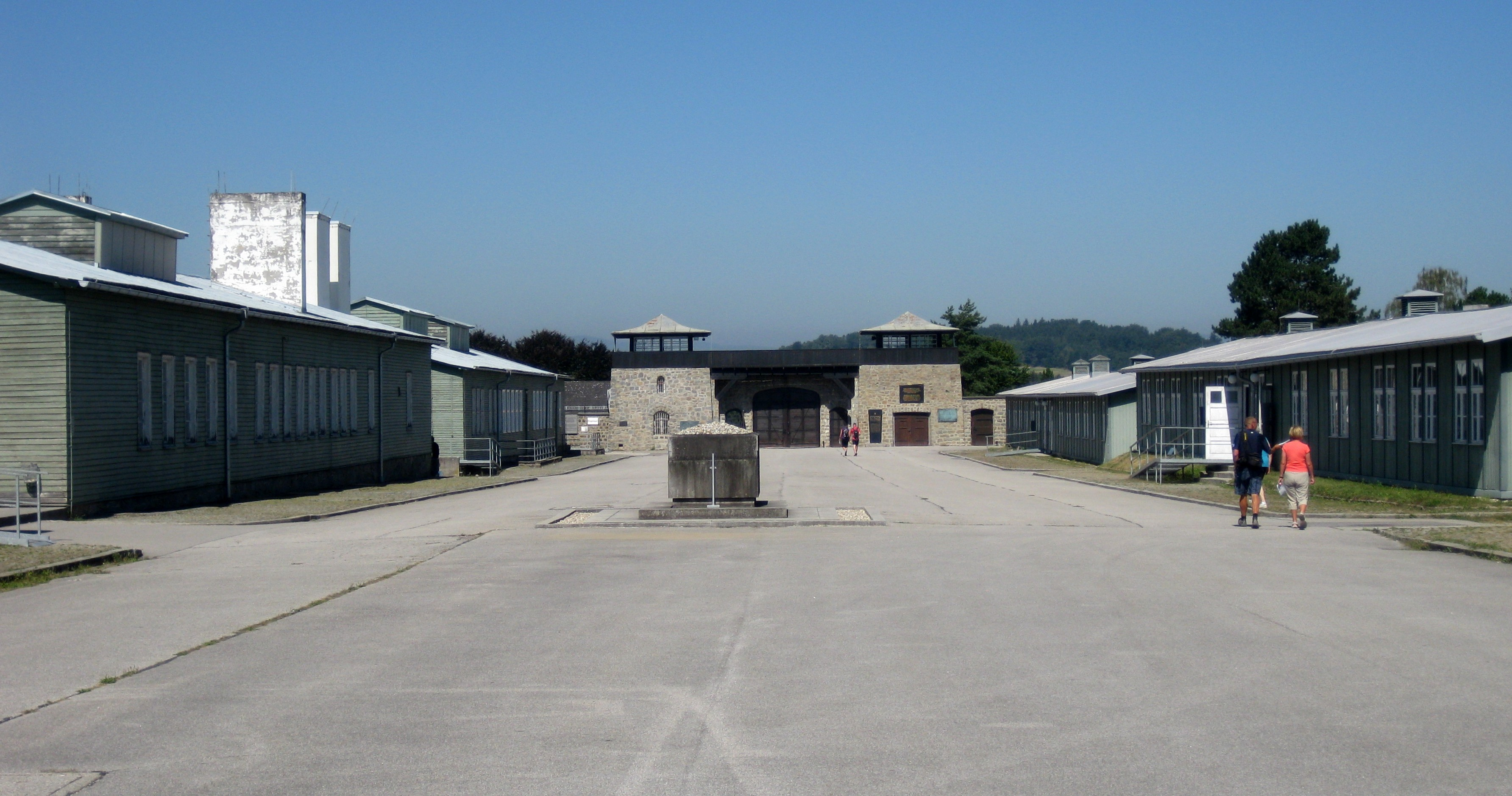 Gedenkstätte KZ Mauthausen / Appellplatz / In der Mitte steht als Mahnmal ein steinerner Sarkophag mit der Inschrift "Mortuorum Sorte Discant Viventes" / deutsche Übersetzung: Aus der Toten Geschick mögen lernen die Lebenden / Dieses Monument wurde 1949 errichtet, als das ehemalige KZ Mauthausen zu einem öffentlichen Denkmal erklärt wurde. (vgl.